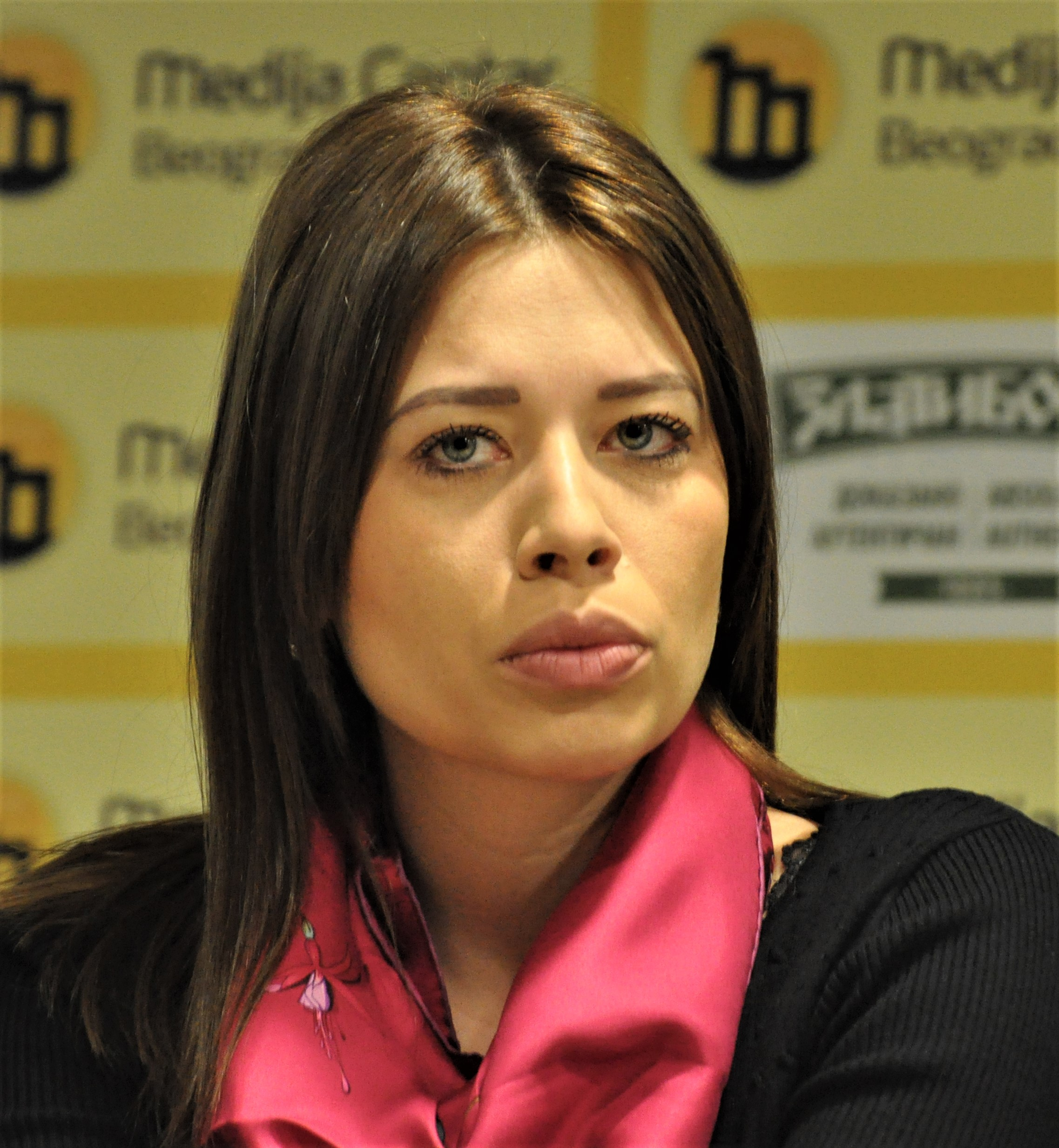 Ирена Вујовић српска политичарка и председница општине Савски Венац